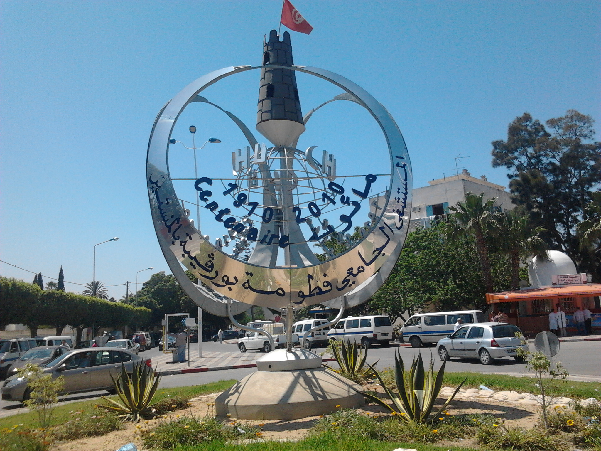 La centenaire de L'hôpital universitaire "Fatouma Bourguiba"